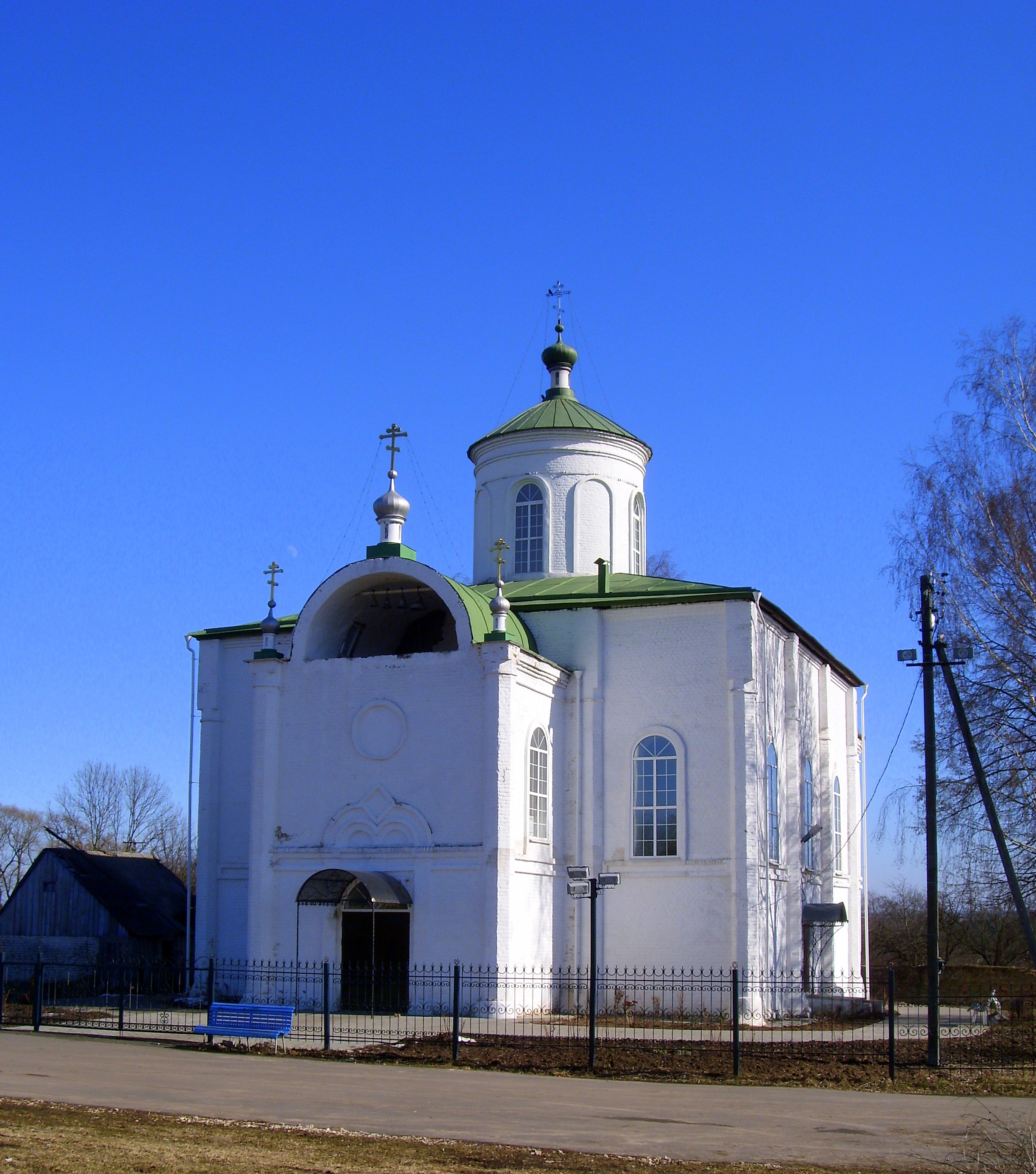 Троицкая церковь с интерьером и приделами «Святого Воскресения Христова и Святых Афанасия и Кирилла» (Брянская область, Жуковка, село Голубея)